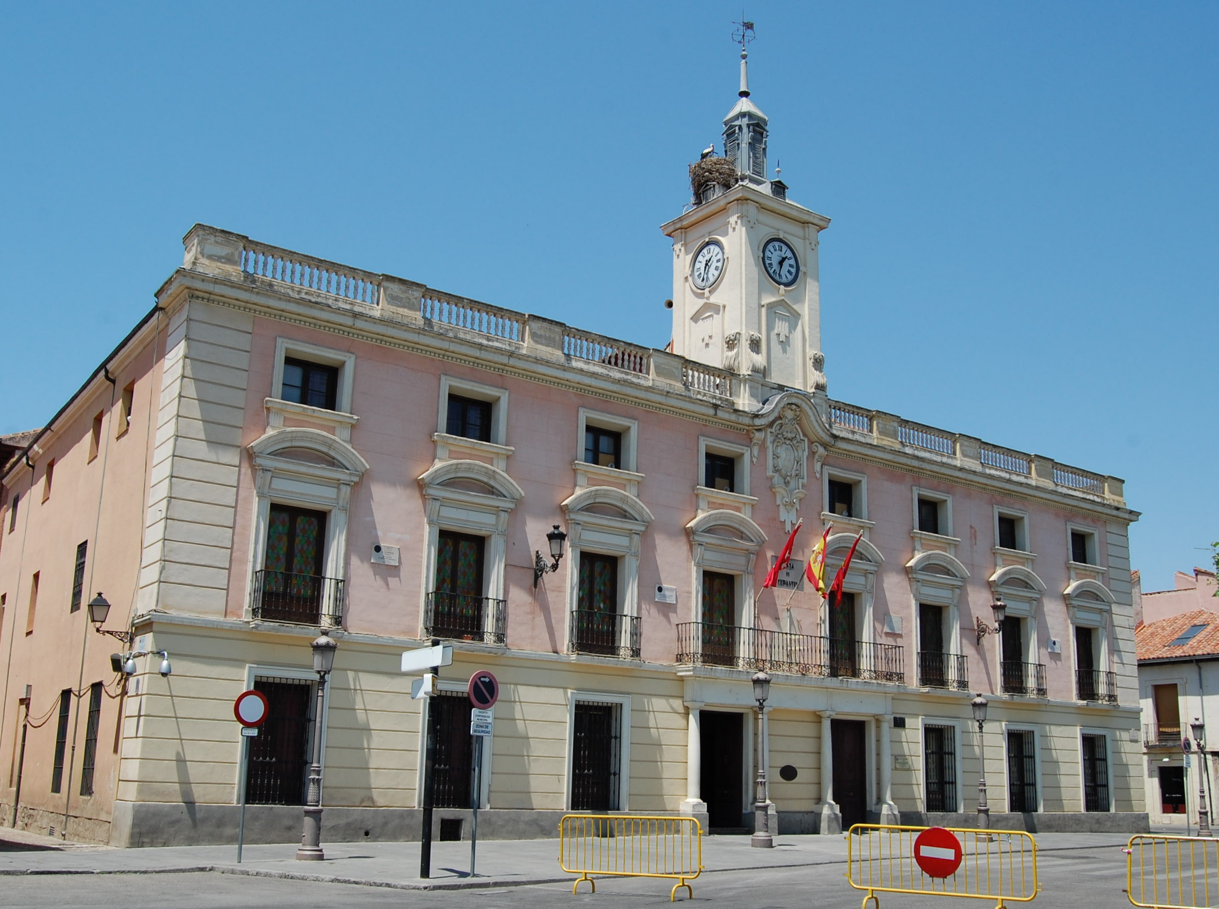 Fachada principal del Ayuntamiento de Alcalá de Henares (Comunidad de Madrid - España). Edificio de 1674, cuya última reforma se realizó en 1924 por el arquitecto municipal José de Azpíroz.